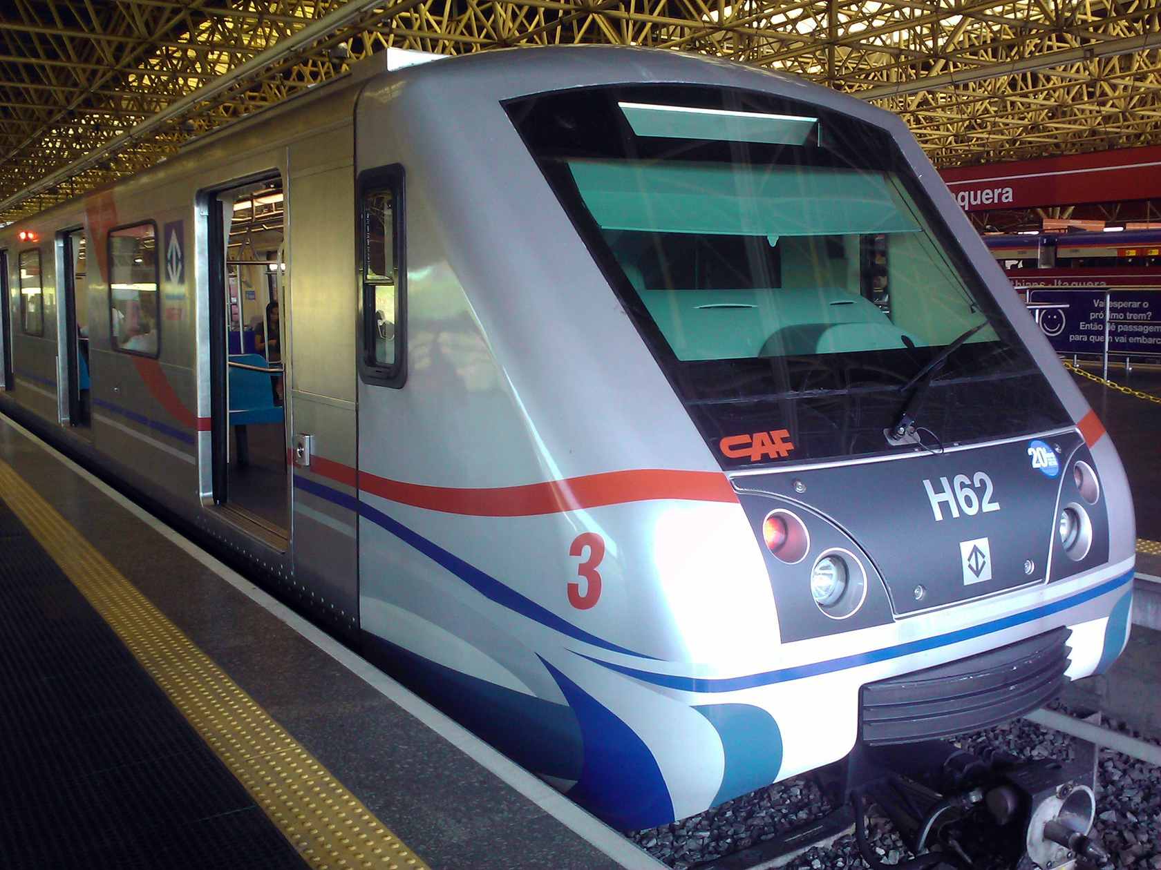 Trem do Metrô de São Paulo, Brasil.